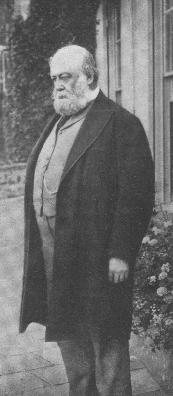 Robert Gascoyne-Cecil (1830-1903) im Jahr 1902.